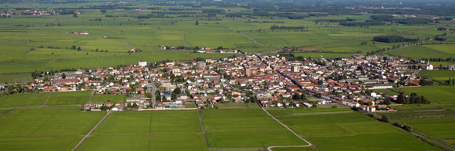 Veduta aerea di Vespolate; foto di Roberto Fornaroli e Ottavio Furlanetto - 2005